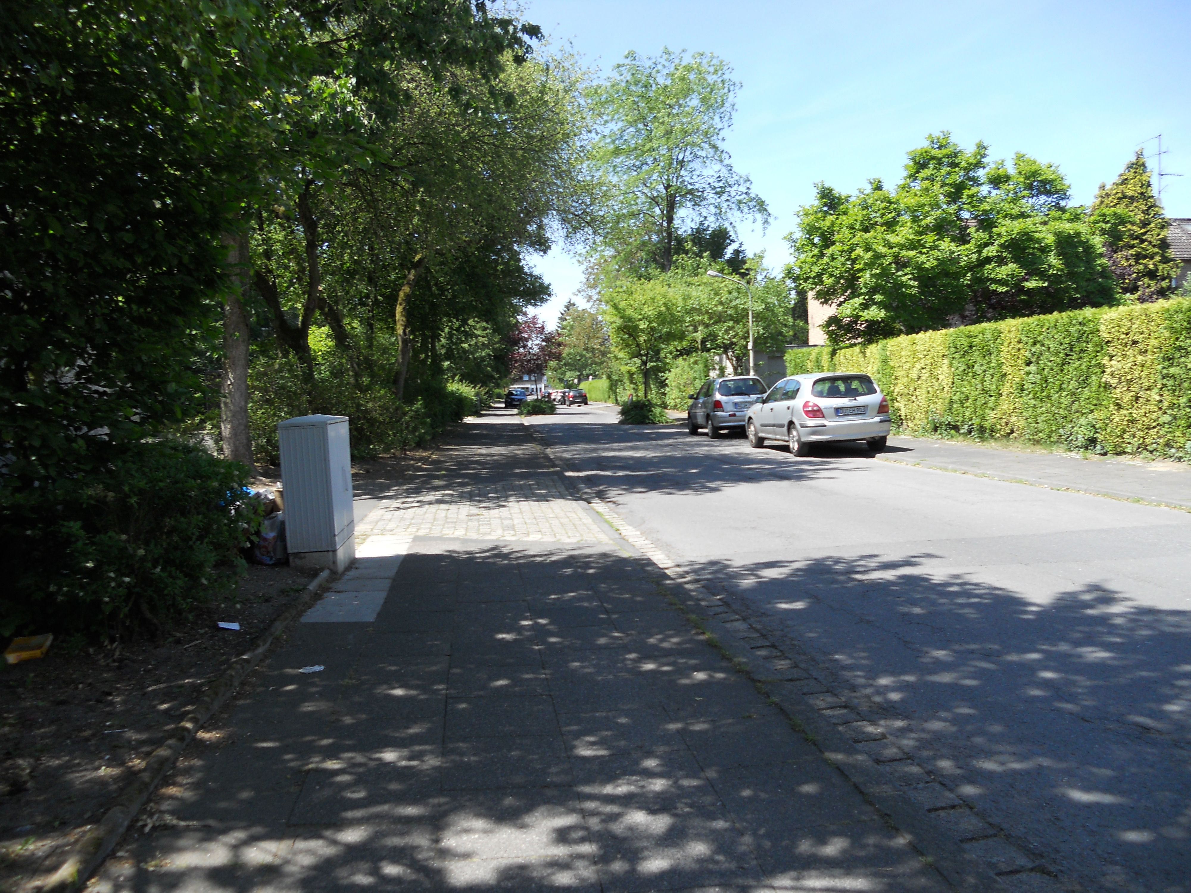 Ungelsheims Grün am Beispiel der Clausthaler Straße